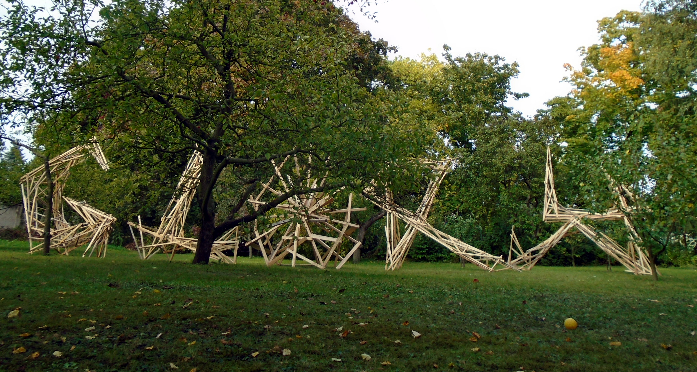 Prostorová instalace Glory, kterou vytvořil Lukáš Kladívko se svými spolupracovníky během festivalu GlorietFest.